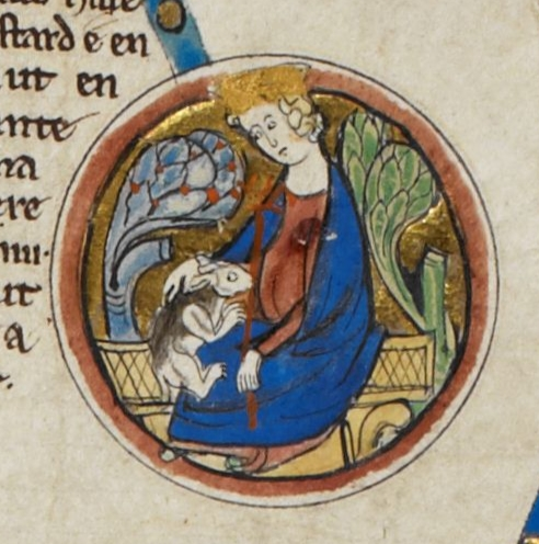 Miniature de Harold Pied-de-Lièvre dans une généalogie royale du XIIIe siècle.